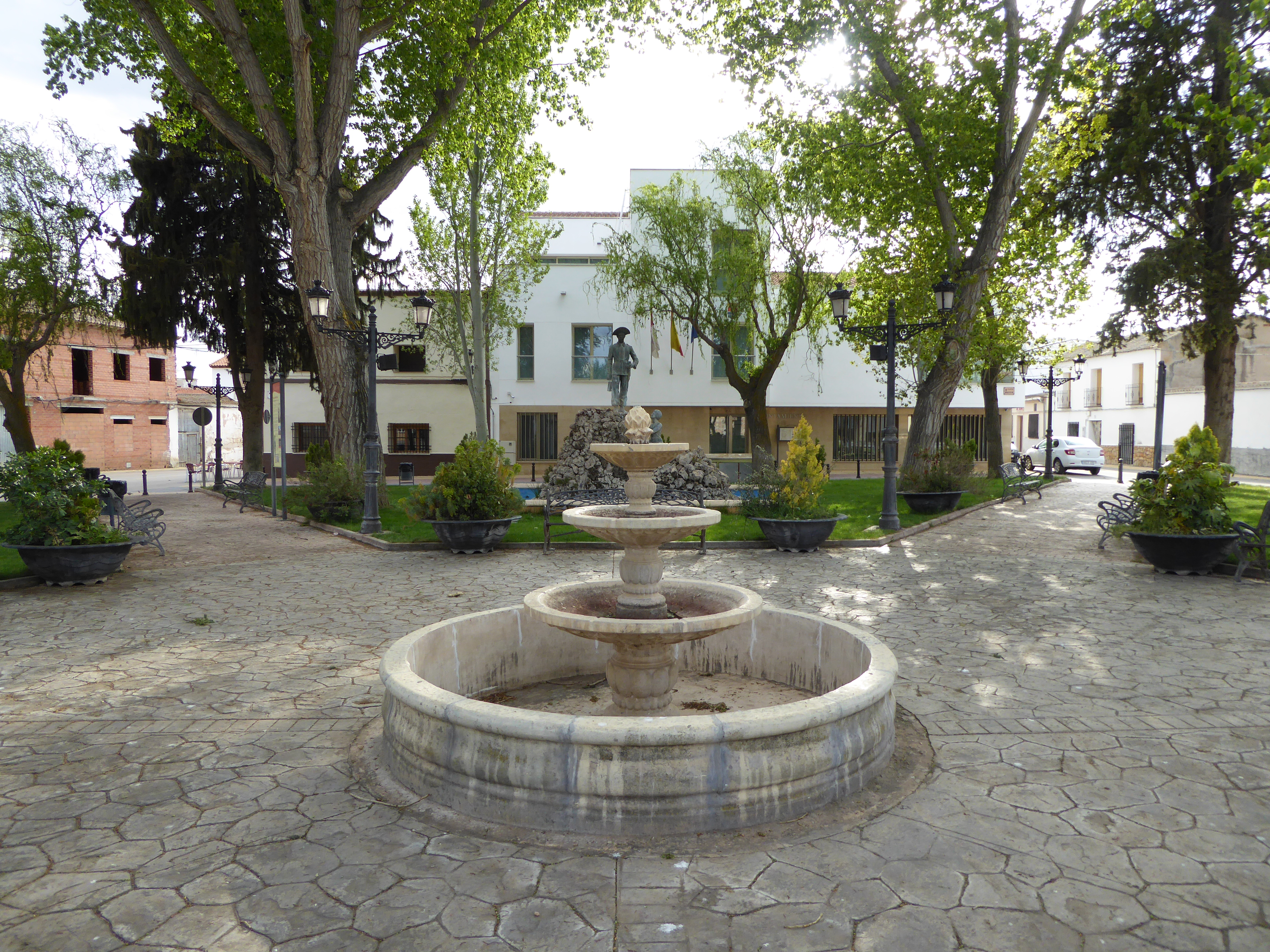 Osa de la Vega